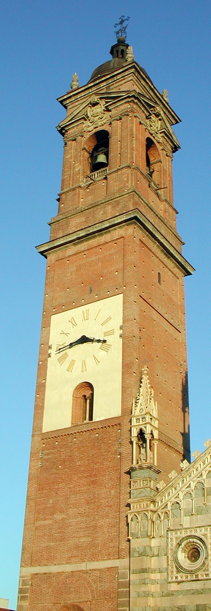 Campanile del Duomo di Monza